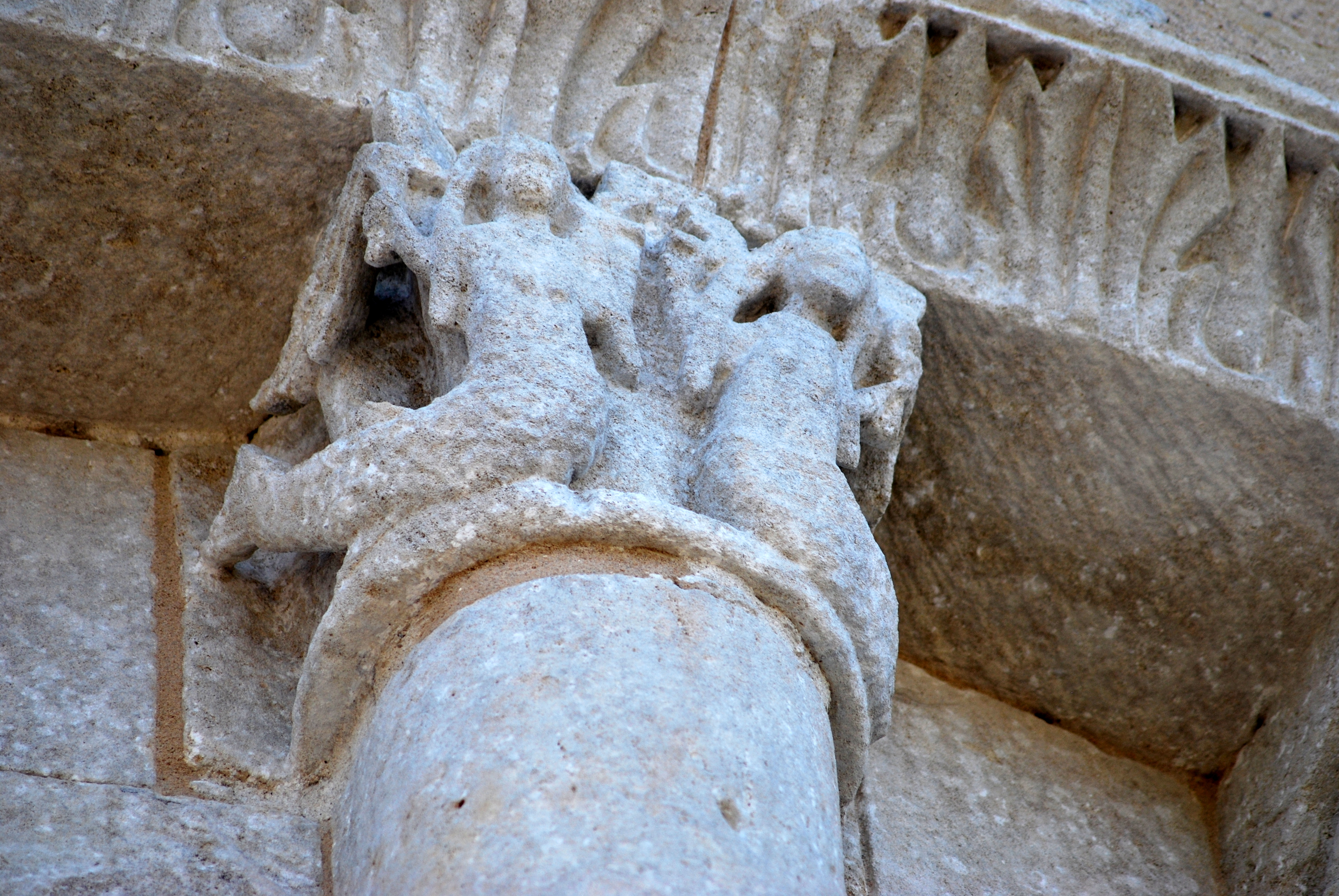 Église Saint-Quentin de Baron, Gironde